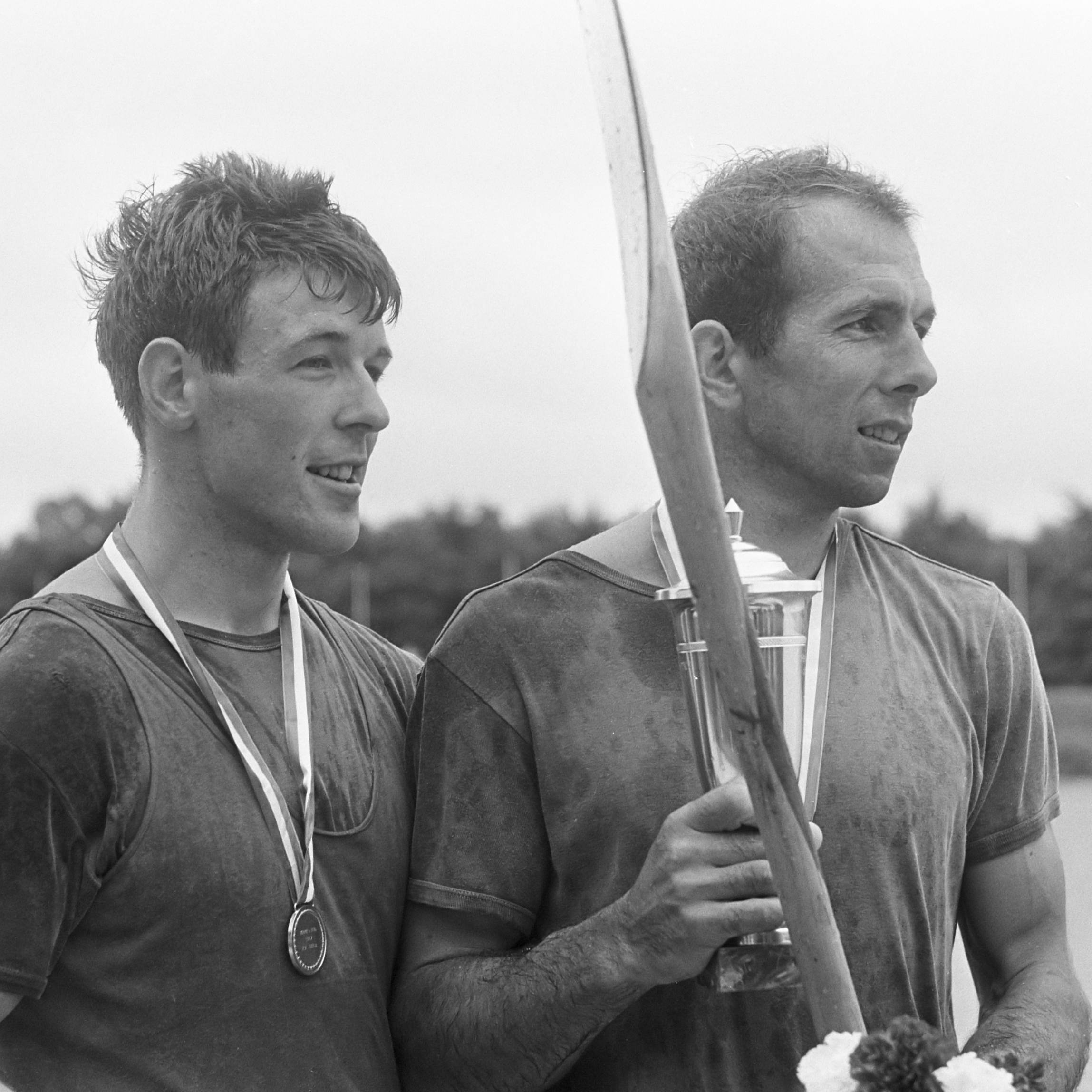 Nederlandse Kampioenschappen Kano op Bosbaan. Hoekstra (links) en Geurts 30 juli 1967